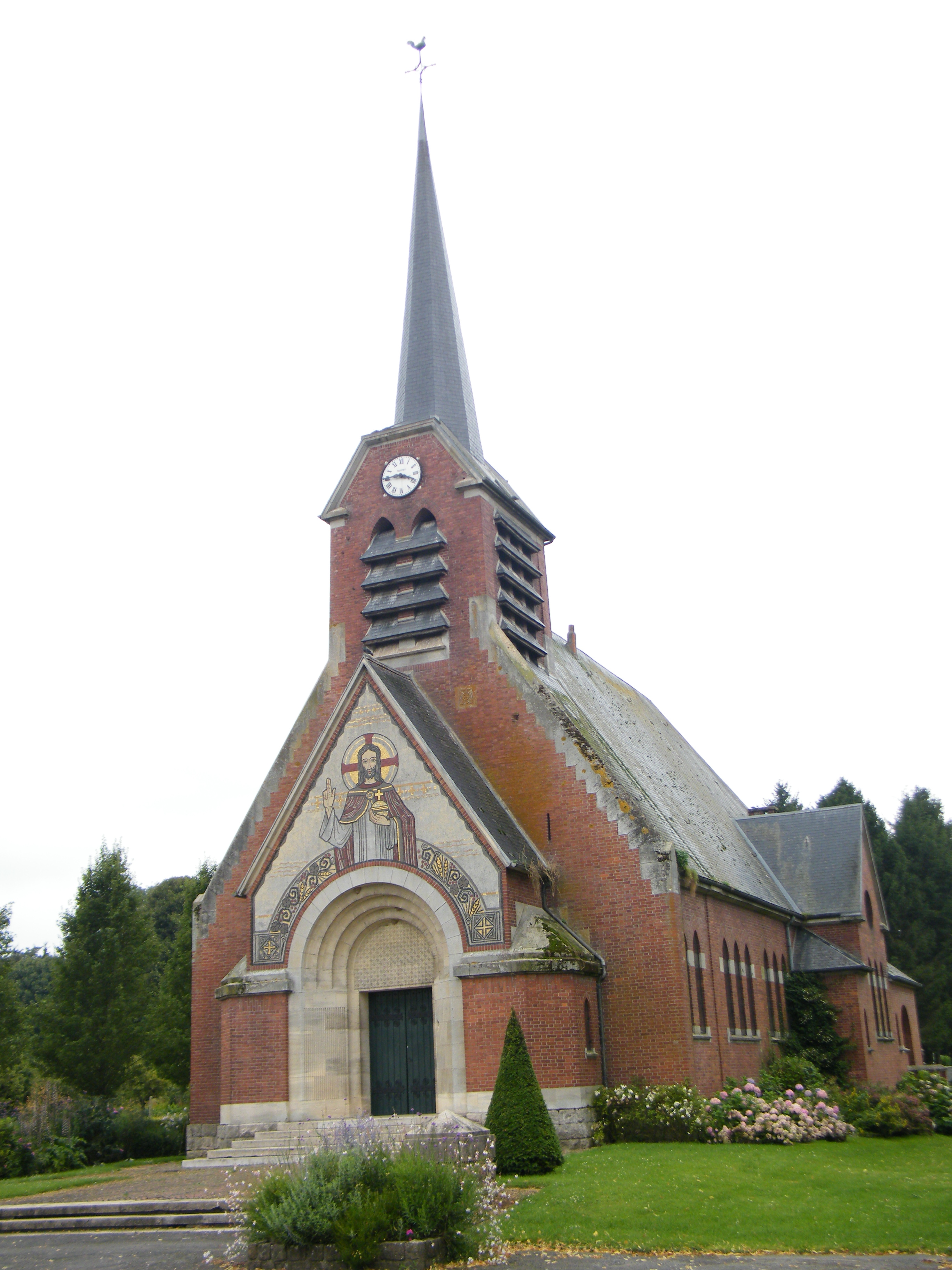 église.